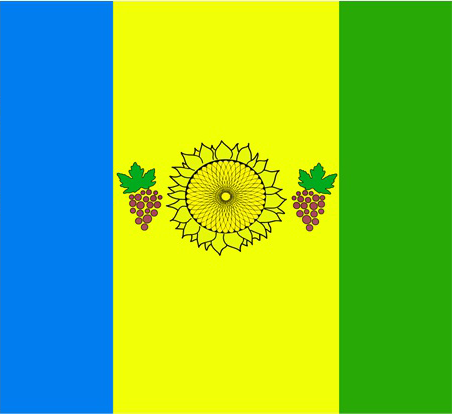 Прапор с. Виноградне (Болградський район)